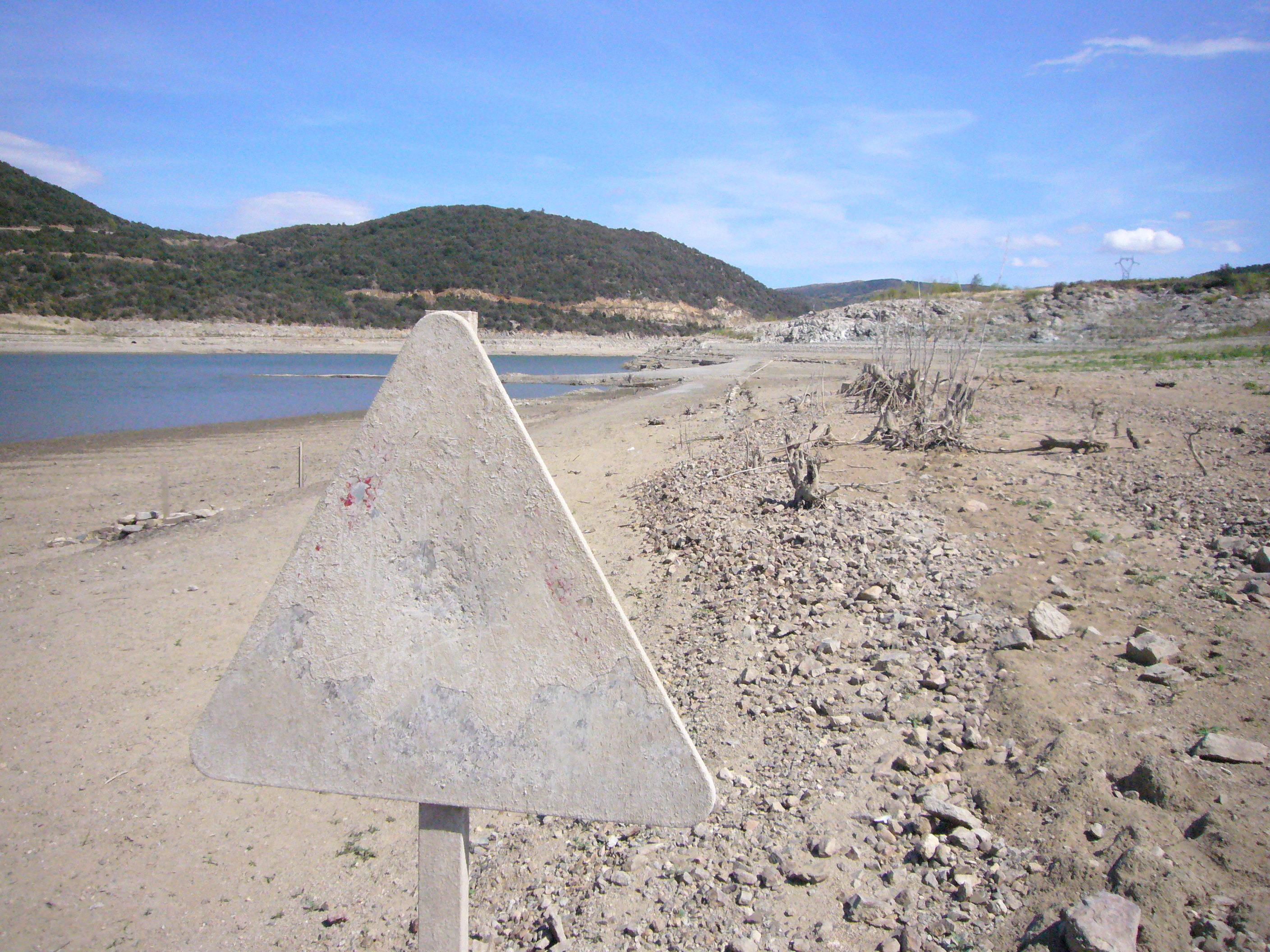 Ancien panneau de signalisation de la D9, dévoilé par la baisse de l'eau du lac de Caramany (66, France)